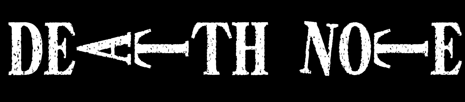 Logo de la serie de anime y manga Death Note.